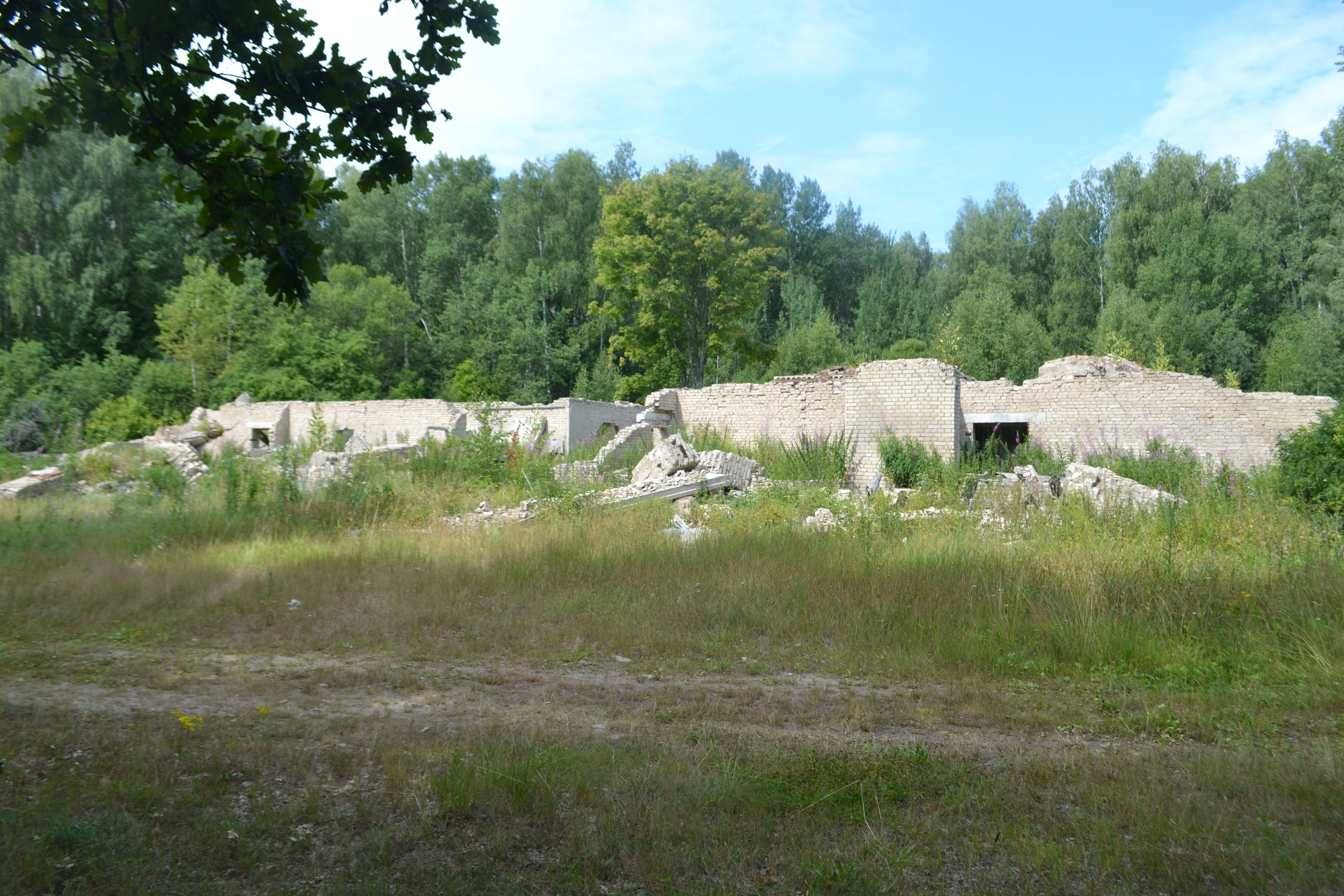 Пионерлагерь Пруды (Шатурский район)